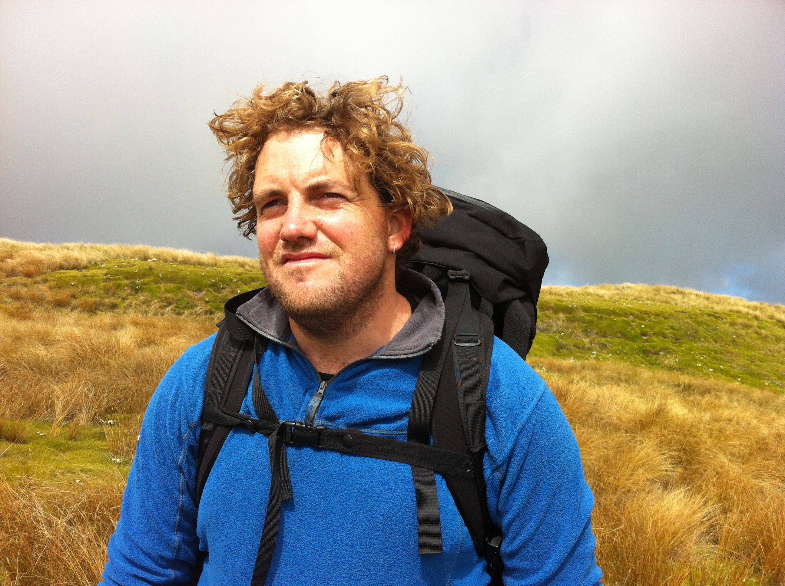 ניו זילנד 2012